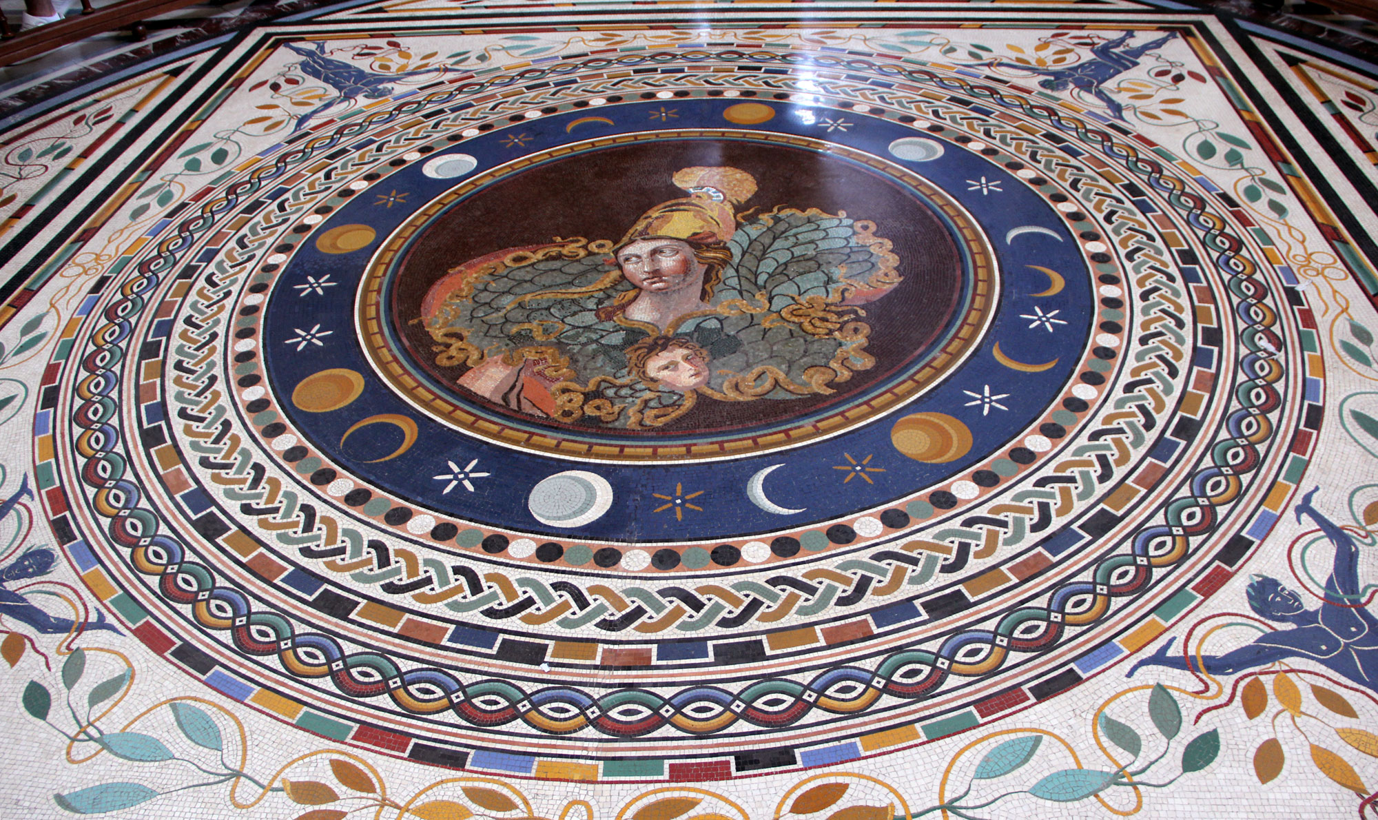 Mosaïque découverte en 1741 dans les fouilles d'une villa romaine de Tusculum. Restaurée, elle ouvre la salle du Museo Pio Clementino au Vatican.